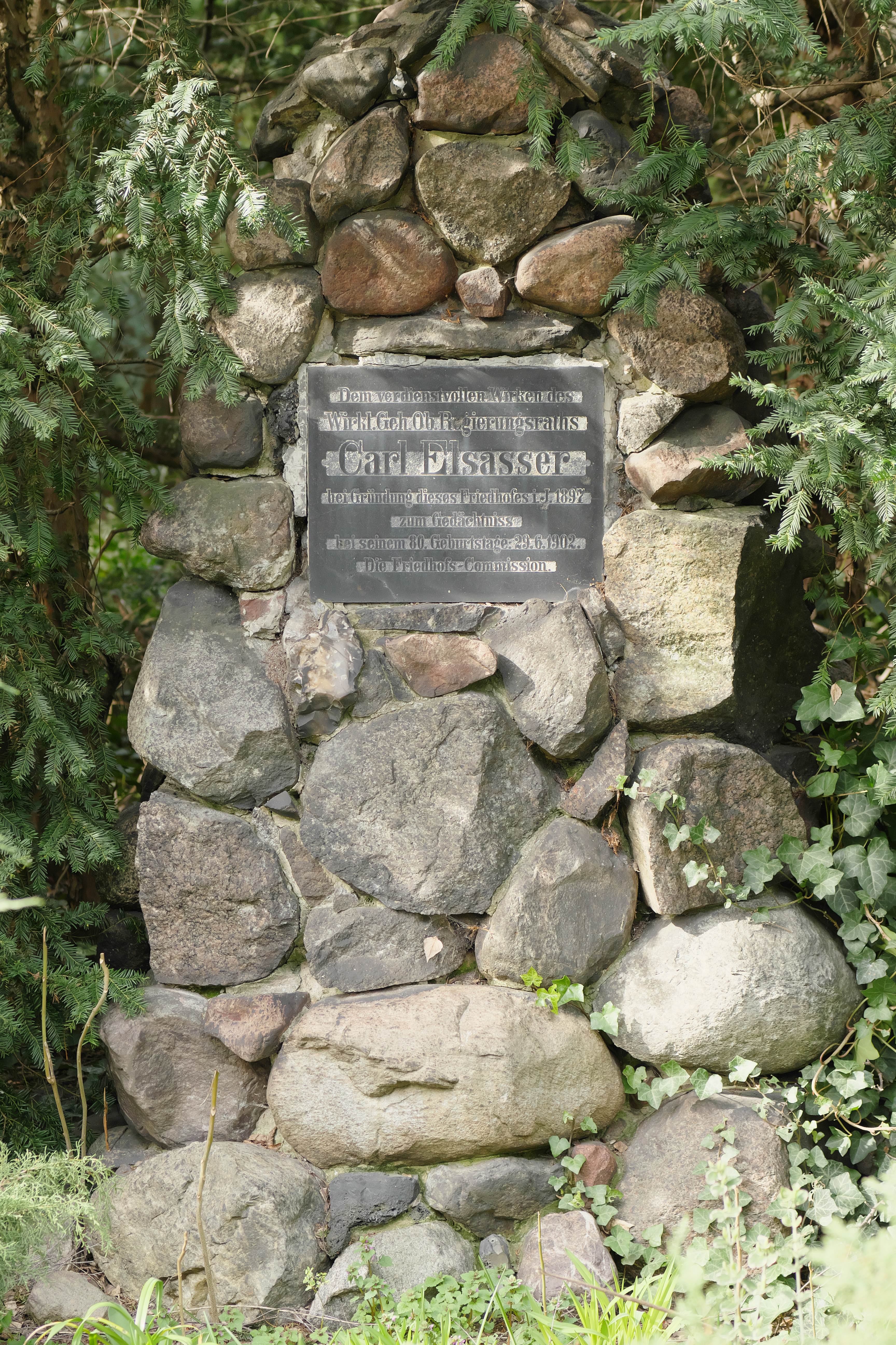 Denkmal für Carl Elsasser auf dem Kirchhof Sankt Simeon und Sankt Lukas in Berlin-Britz